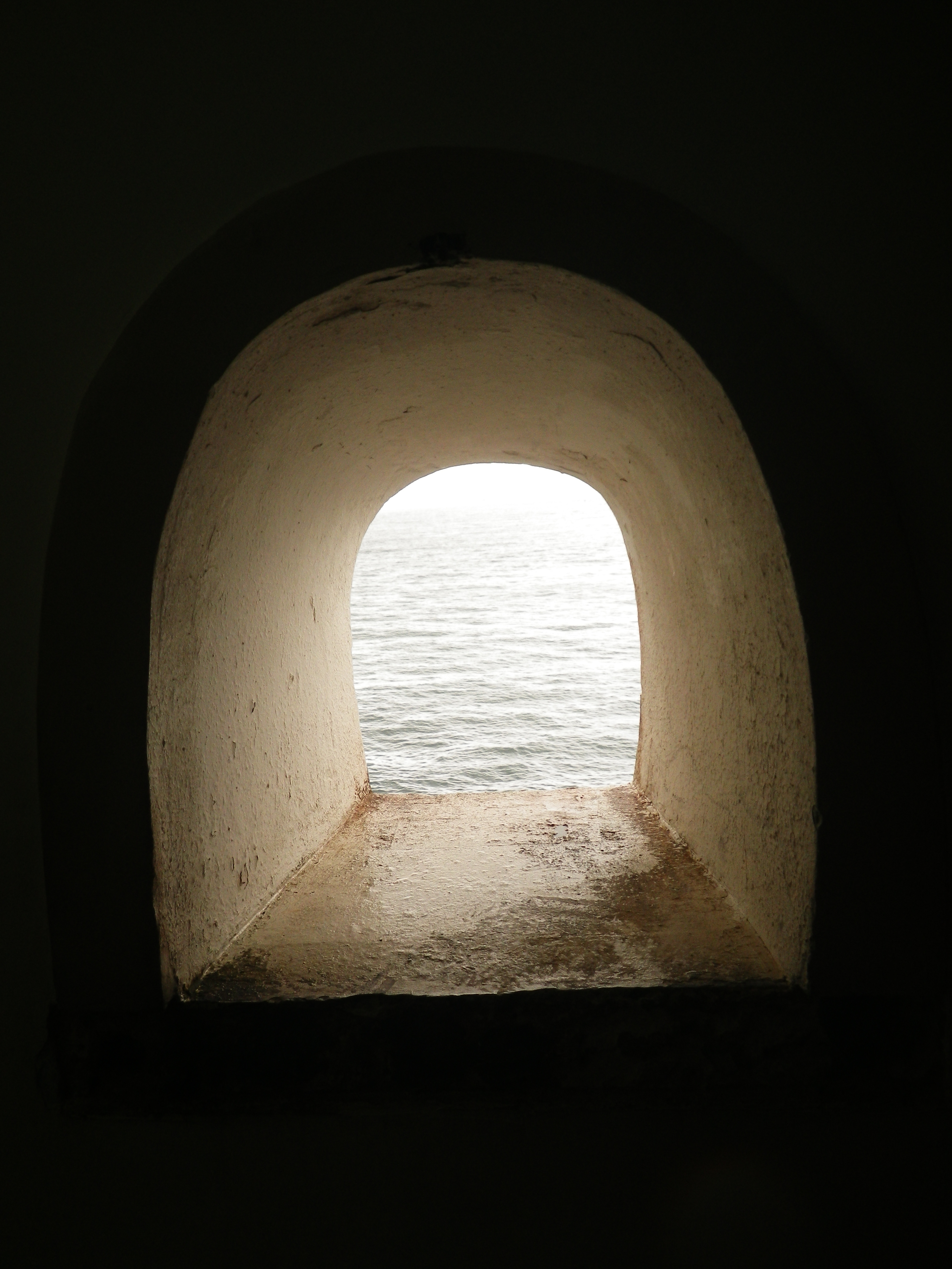 Janela de um canhão da Fortaleza de Santa Cruz da Barra